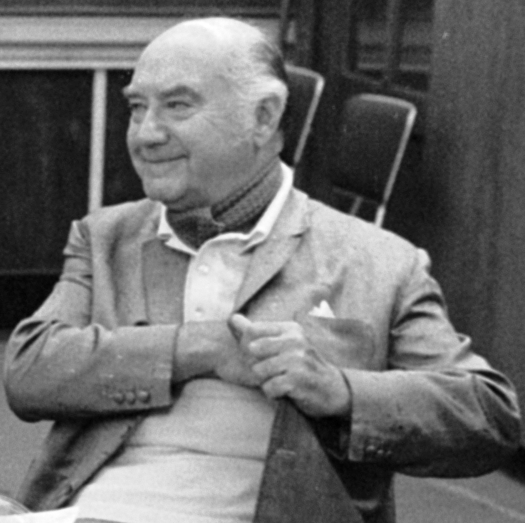 Svéd Sándor magyar operaénekes (bariton).